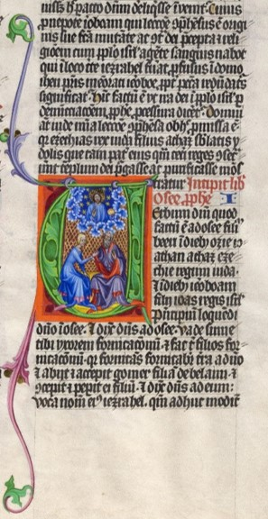 Der Prophet Hosea. Initiale V aus der Korczek-Bibel